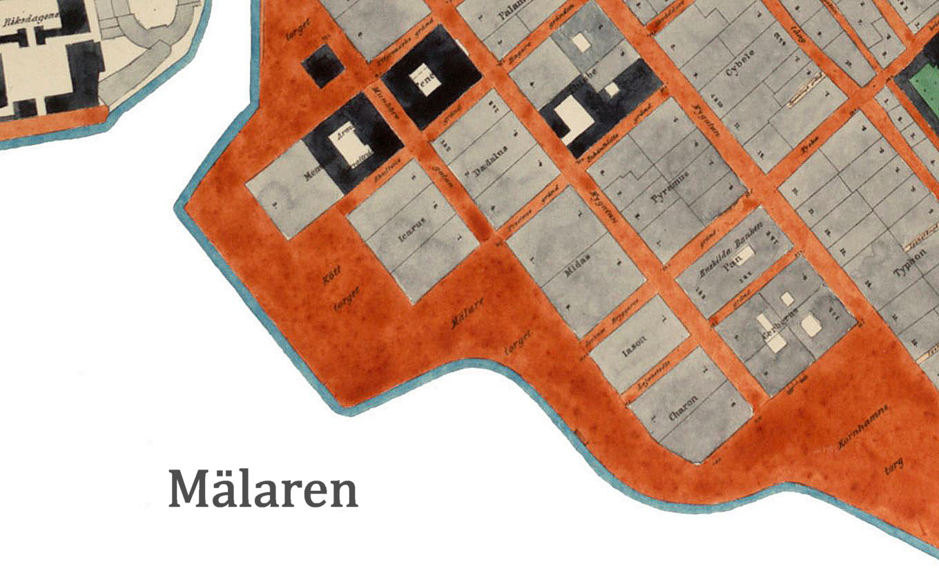 Del av Stockholmskarta från 1863 visande Köttorget på Gamla stan